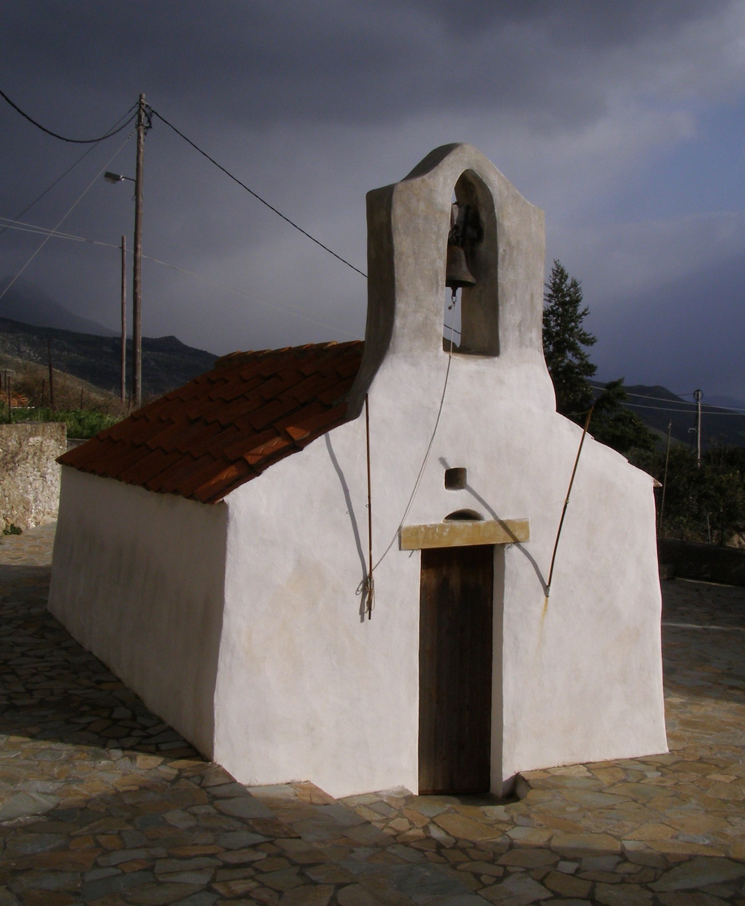 Die Kapelle "Agii Asomati" in Asomatos, Kreta